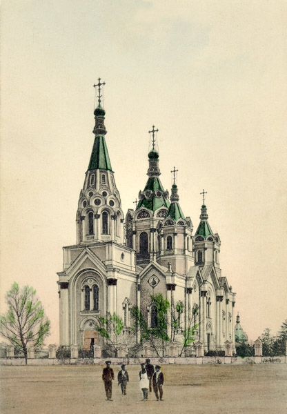 Богородице-Рождественский собор Открытка начала XX века с изображением Богородице-Рождественского собора в Красноярске